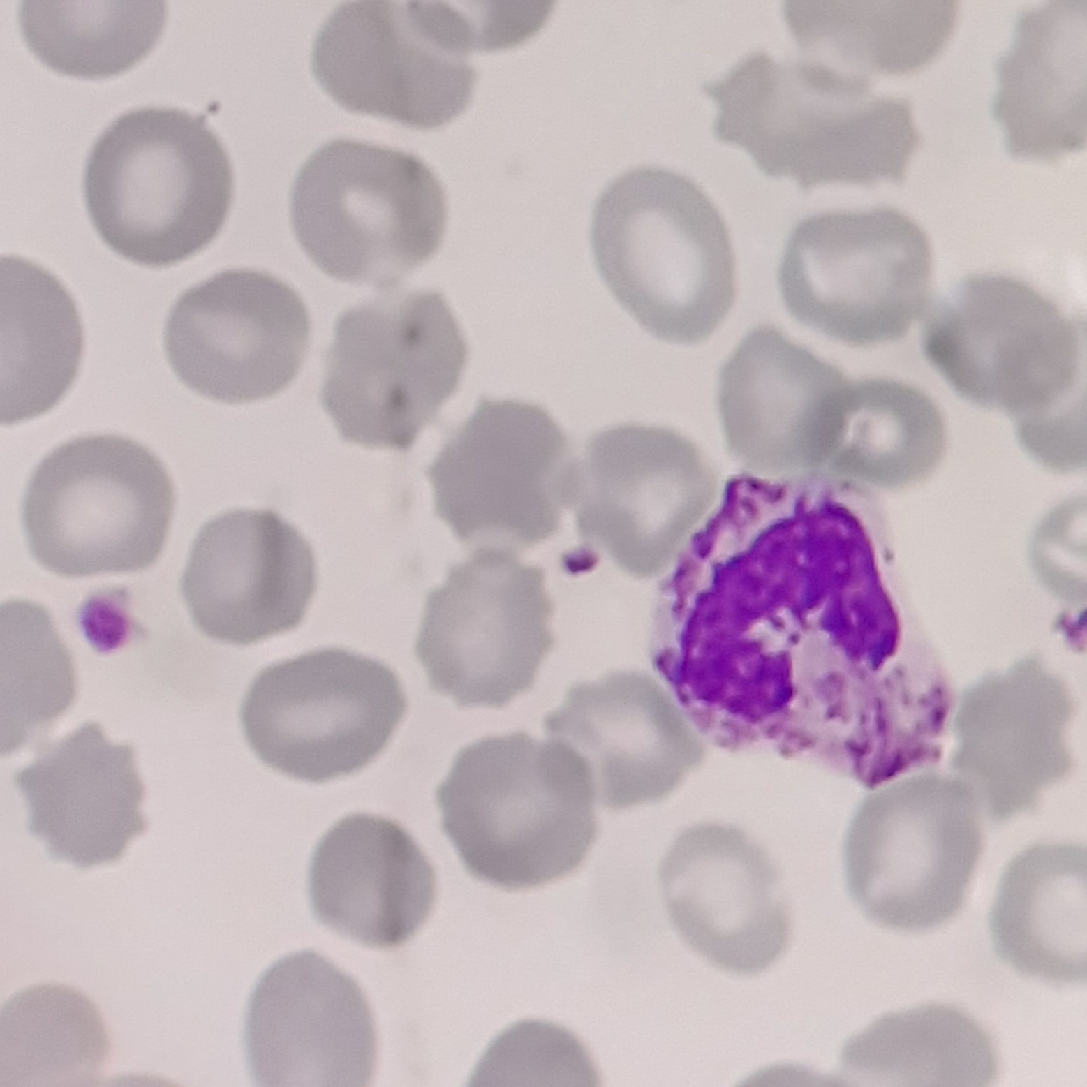 Cayado con granulación tóxica en paciente con neumonía